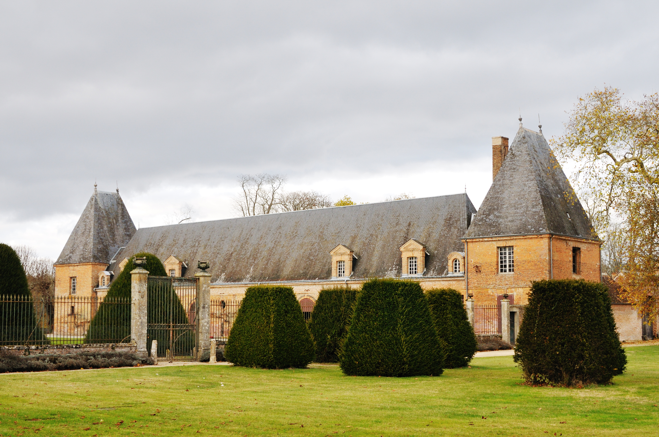 Château de La Ferté-Imbault, Loir-et-Cher, France